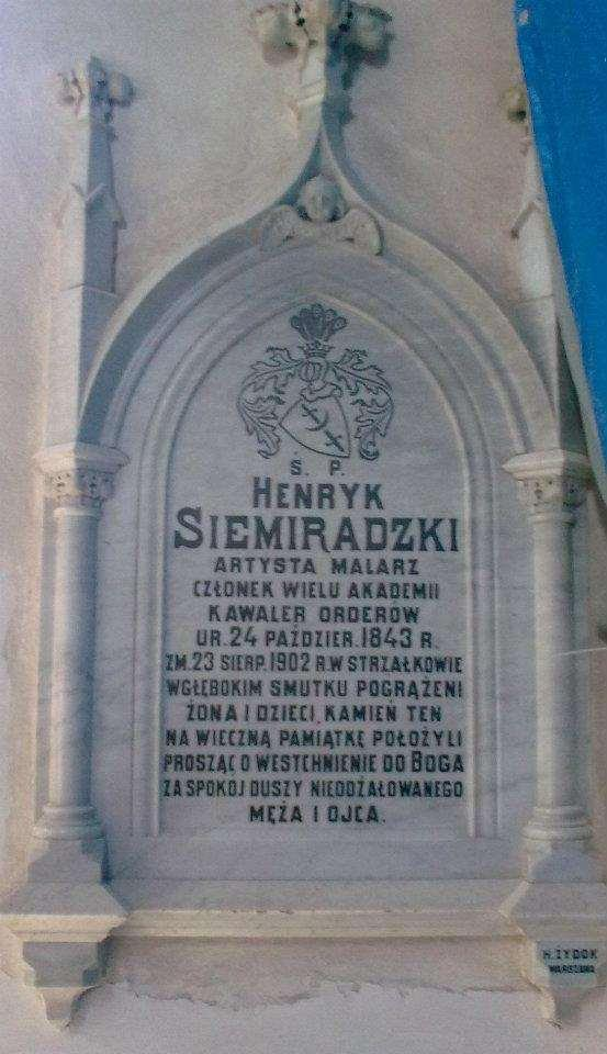 Tablica w kościele